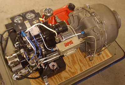 Solar T62 engine